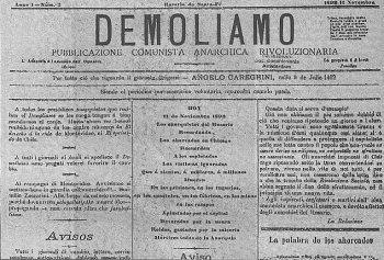 Portada del Demoliamo, periódico anarquista de ROSARIO, fundado el 10 de noviembre de 1892.